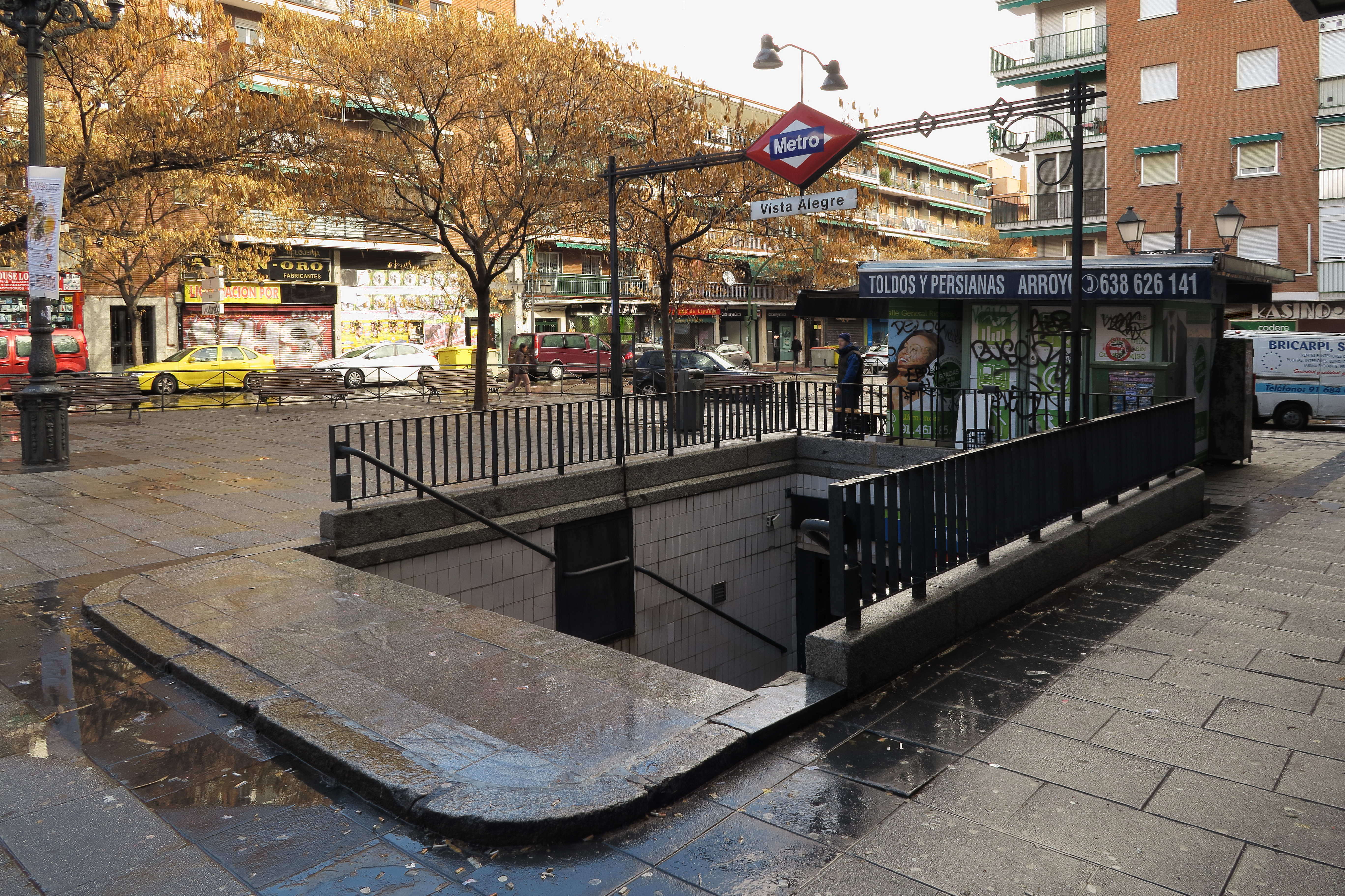 Estación de Vista Alegre